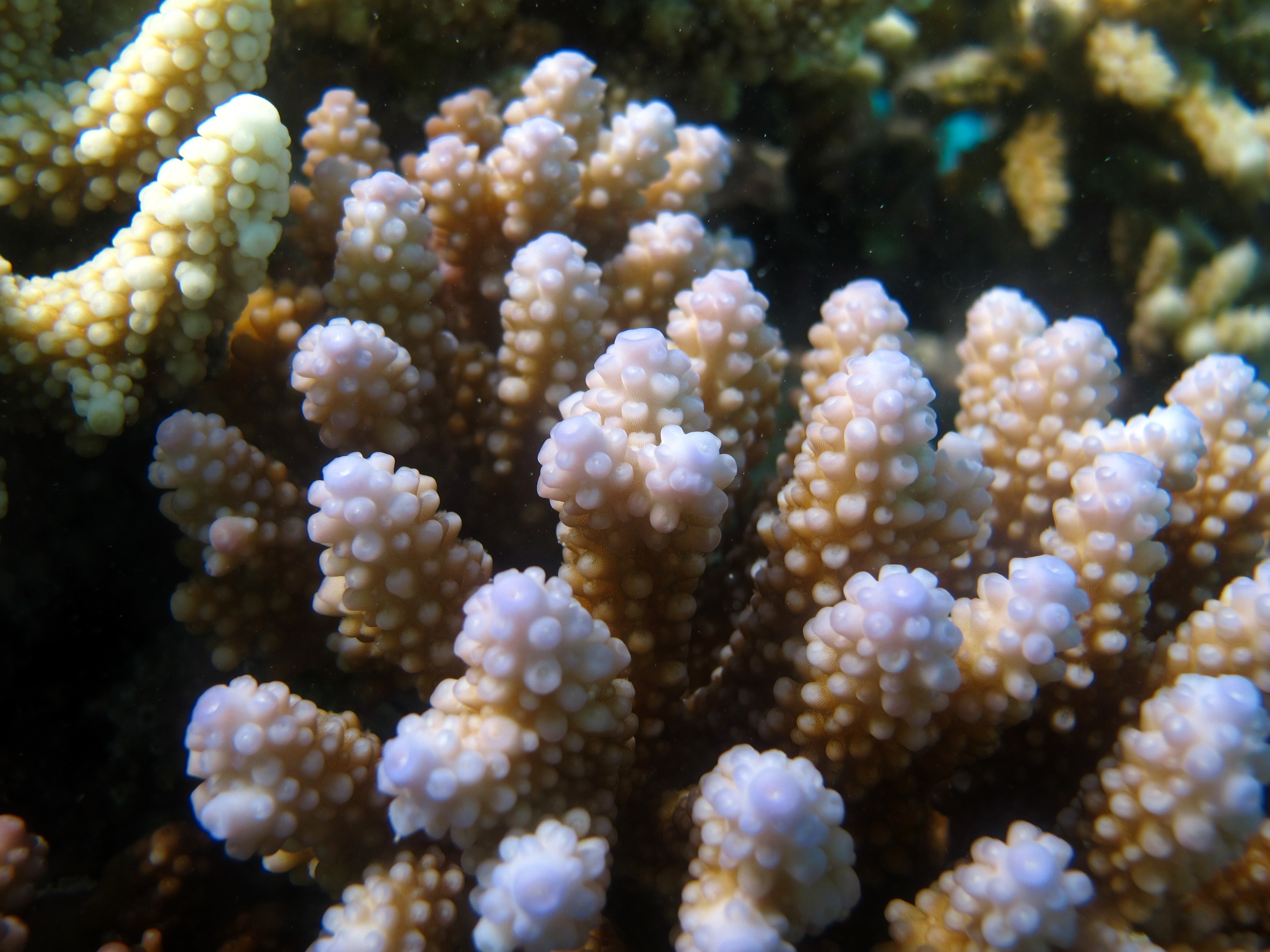 Gros plan sur du corail Acropora retusa aux Maldives (atoll de Baa).